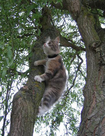 Maine Coon poes Satine. 5 maanden oud.